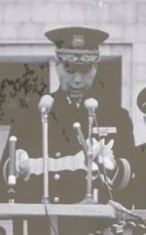 第2代海上幕僚長長澤浩。昭和31年5月16日術科学校開校式における訓示。第1術科学校に掲示されている。